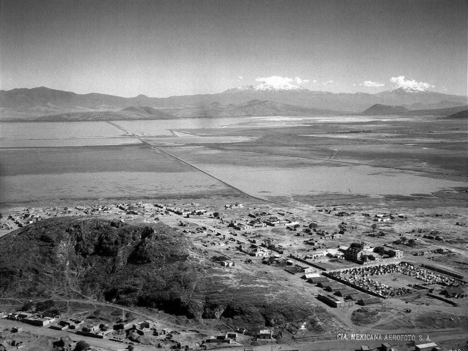 esta imagen es antigua del pueblo peñón de los baños con el lago de Texcoco donde solían a cazar los pobladores